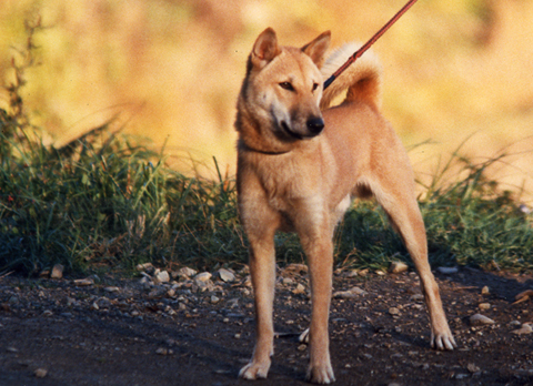 縄文柴犬 図４